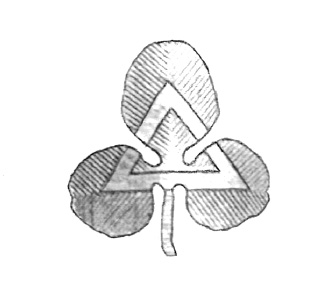 Logo des norwegischen Skandinavismus